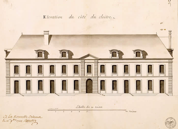 La Nouvelle Orléans, Second Ursuline Convent Building, 1745, architectural drawing by Ignace François Broutin